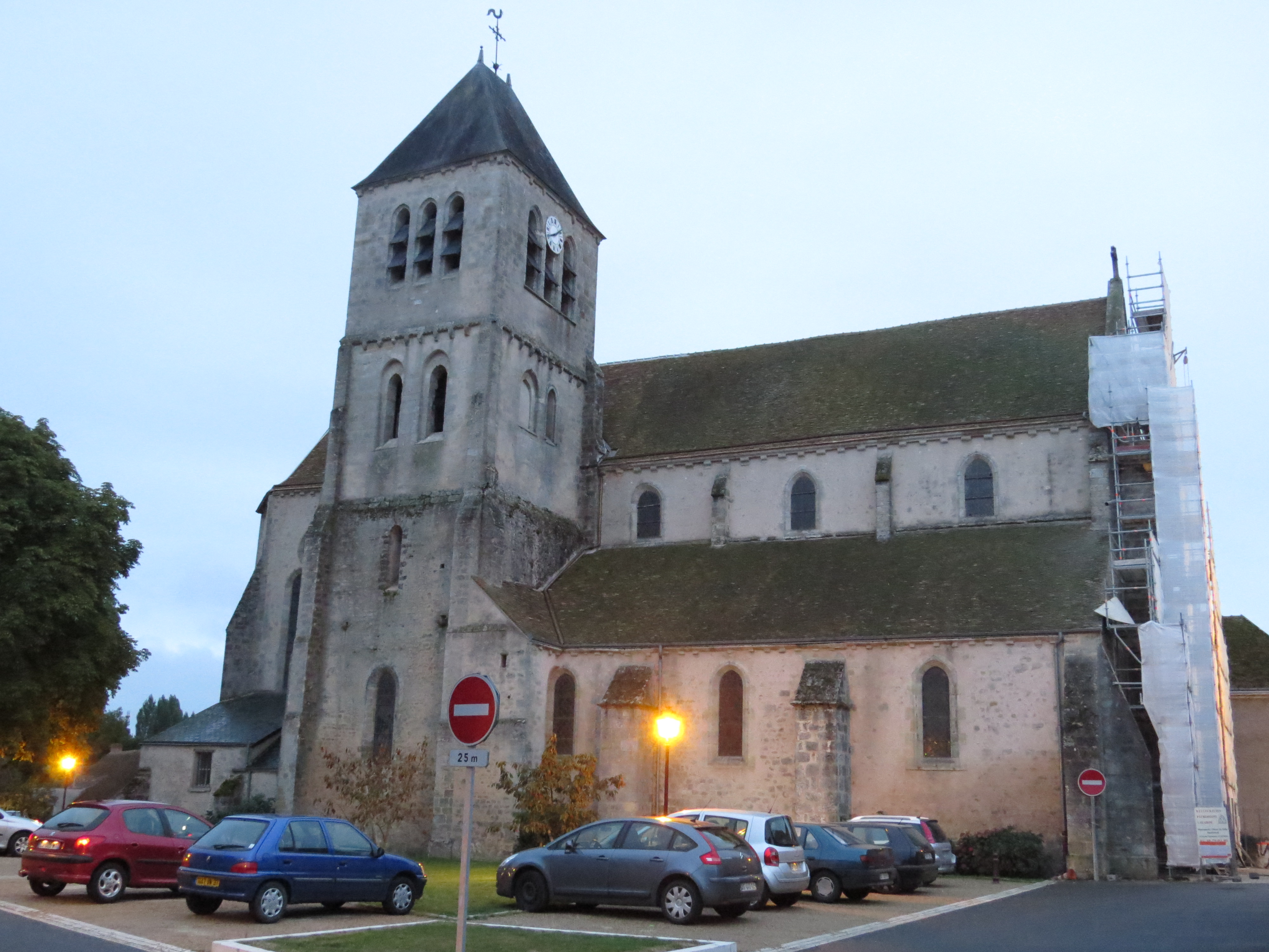 Église Saint-Pierre de Chilleurs-aux-Bois (Inscrit) .